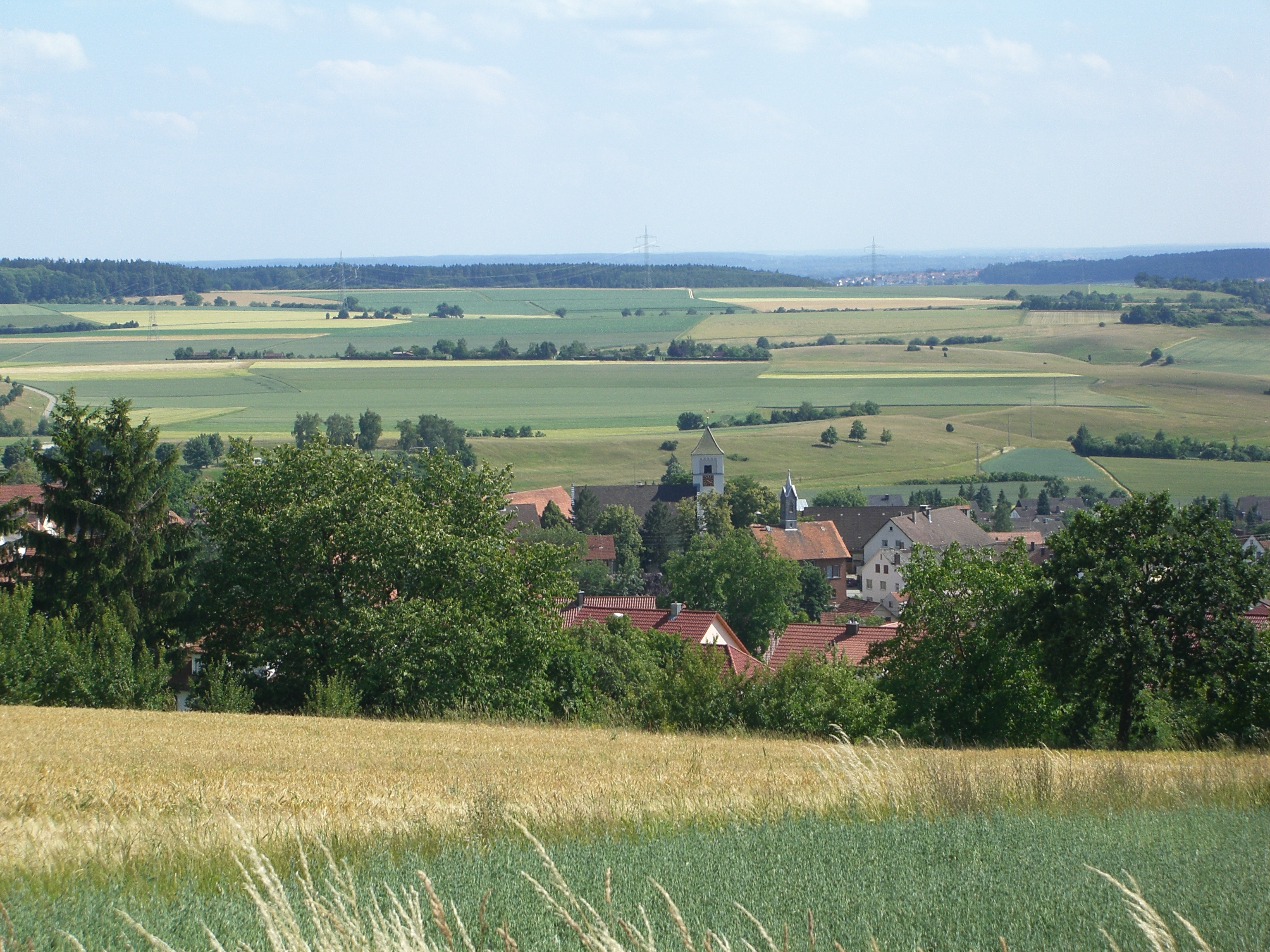 Hohenmemmingen, Kirche